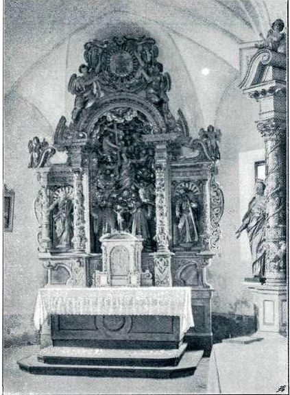 Baročen oltar - Gumnišče pri Šmarju.